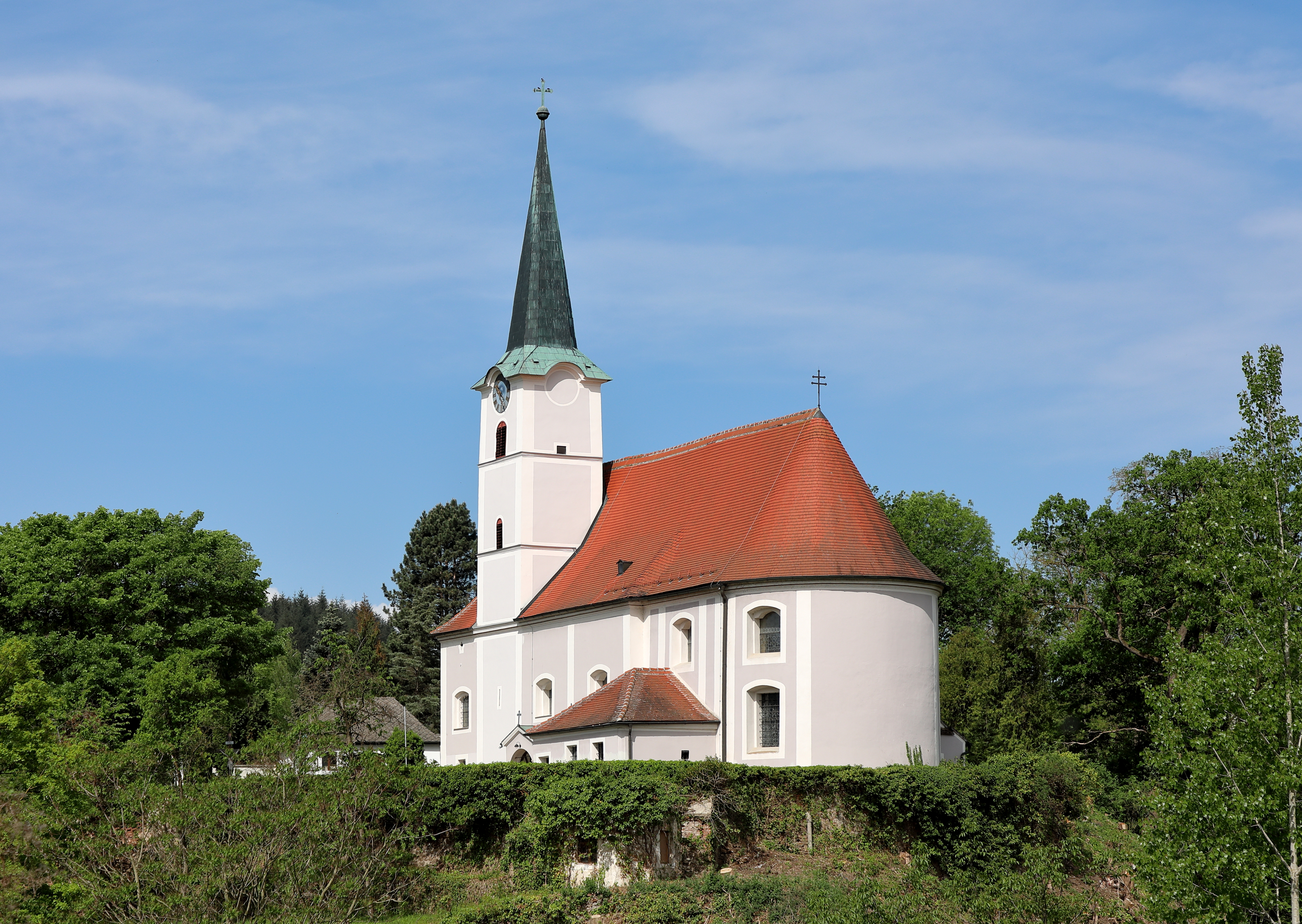 Ostsüdostansicht der röm.-kath. Pfarrkirche hl. Michael in der niederösterreichischen Gemeinde Haunoldstein.Die in erhöhter Lage errichtete Kirche war von einem Friedhof umgeben und hat eine gotische Bausubstanz. Die Errichtung des Turmes und die Langhauseinwölbung erfolgte um 1580. Der Chor und das westliche Joch des Langhauses wurden 1745 gebaut und die Turmbekrönung stammt aus dem Ende des 19. Jahrhunderts.